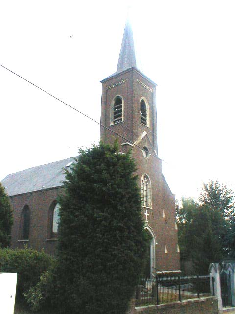 Walon: eglijhe di Hestape